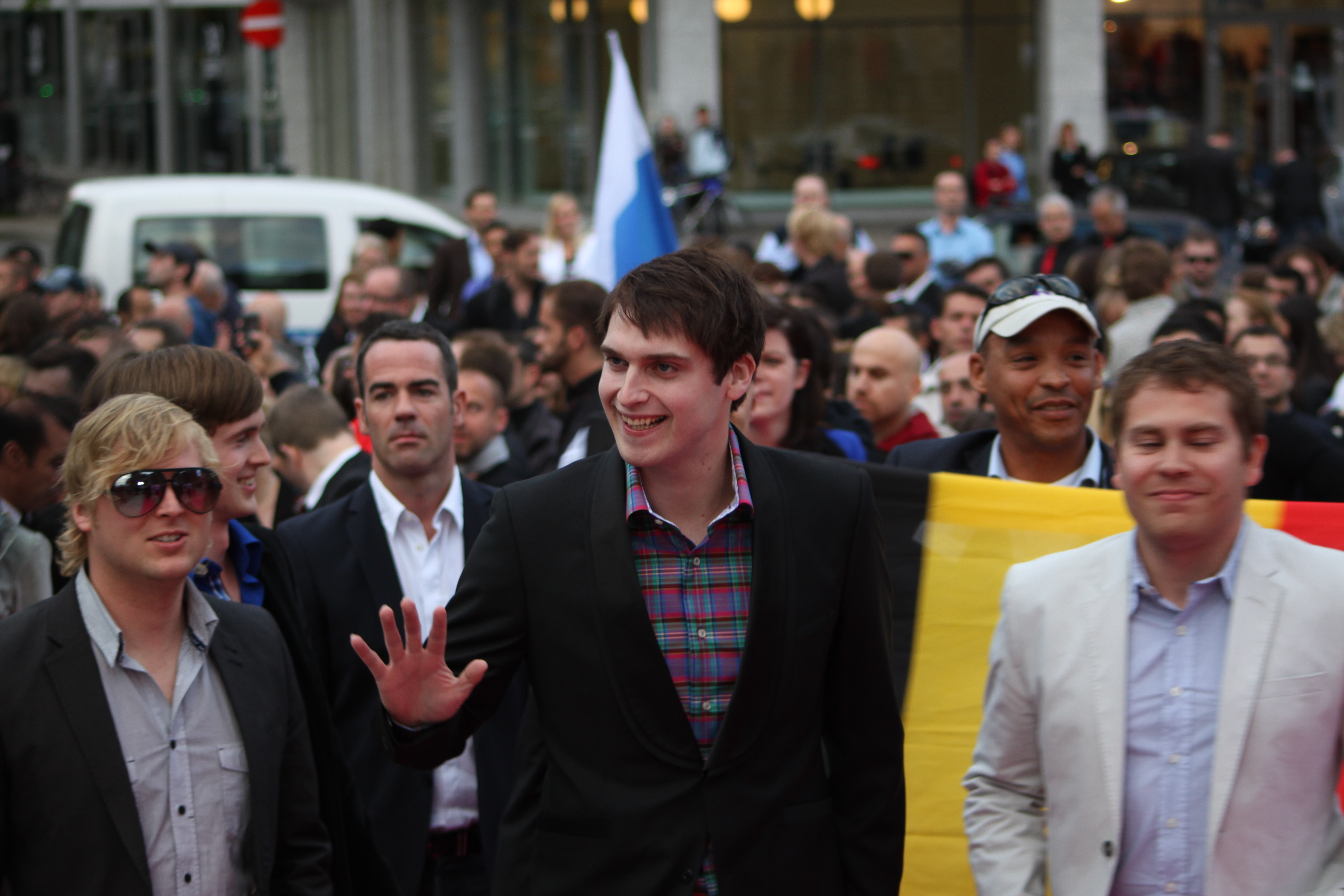 Foto: Vincent Hasselgård, Aktiv I Oslo.no